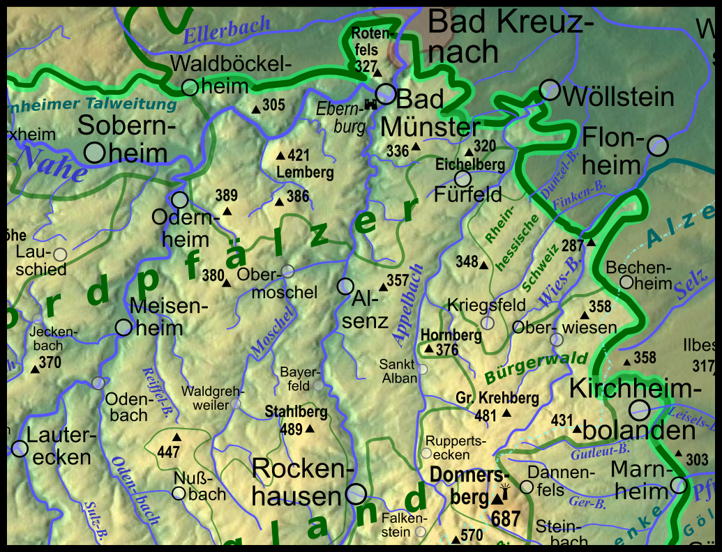 Naturräumliche Karte des Porphyrberglands von Münster am Stein| und der Wiesener Randhöhen (O, Rheinhessische Schweiz) im Nordosten des Nordpfälzer Berglands; auch die Appelhöhen (M) und der Bürgerwald (SO) an der Nordabdachung des Donnersbergs sind komplett abgebildet